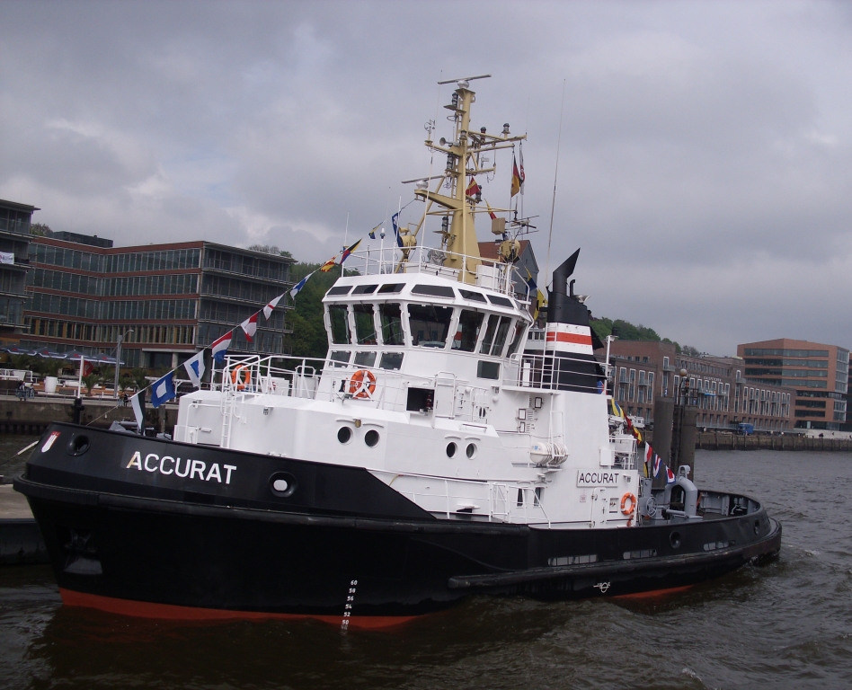 Schlepper Accurat Bearbootcharter Lütgens & Reimers(Ex BREMEN der Reederei URAG) IMO Number: 9045869 MMSI Number: 211208340 Callsign: DDNG Length: 31 m Beam: 10 m